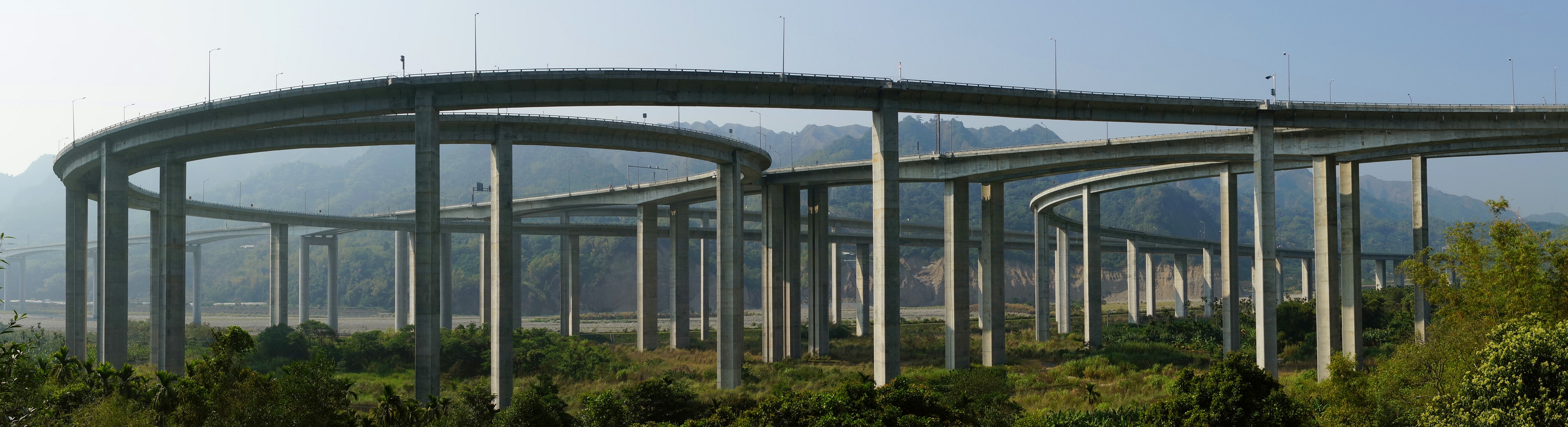 國道六號國姓交流道